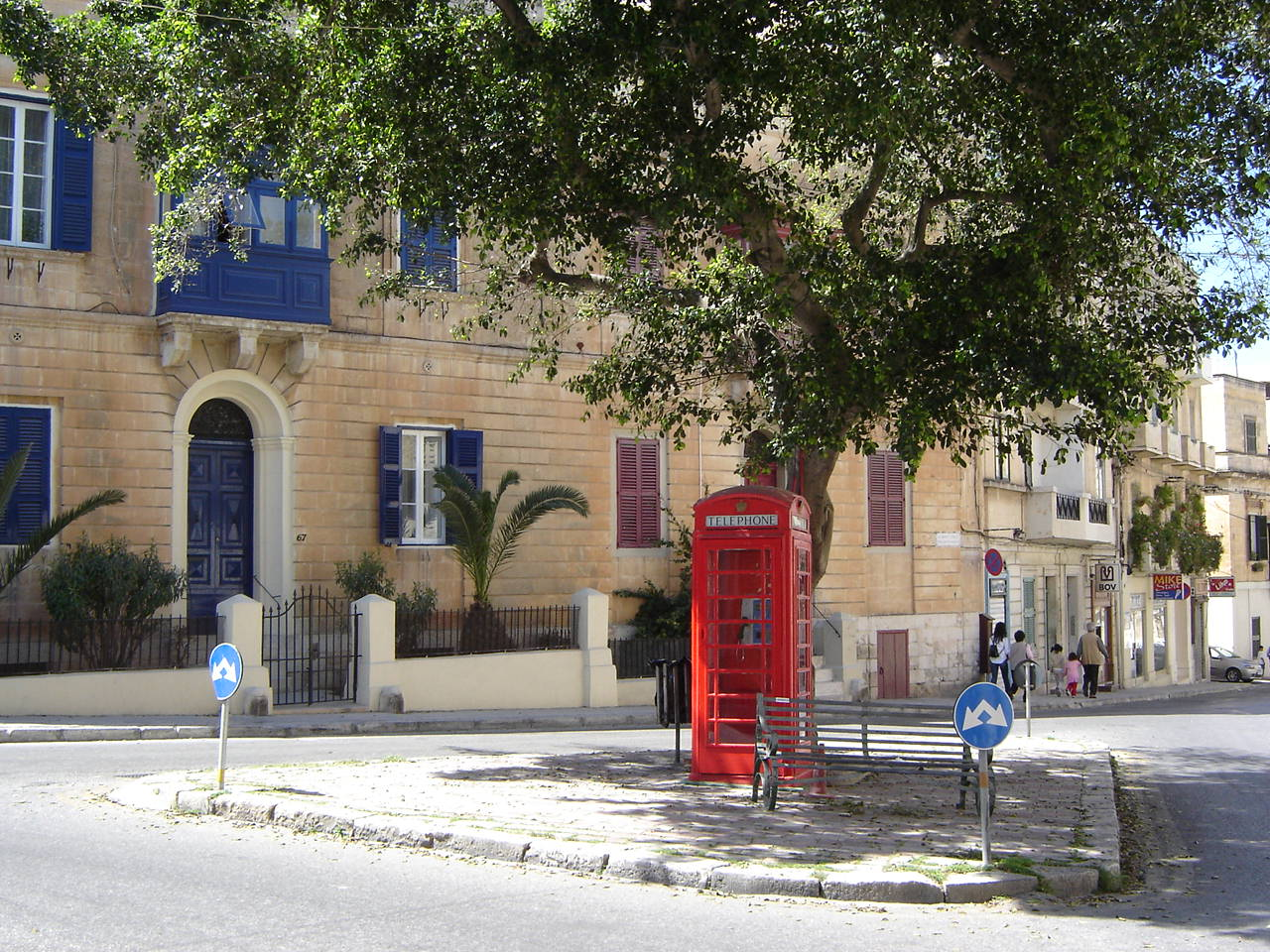 Misrah sir Adrian Dingli - Sliema - Malta